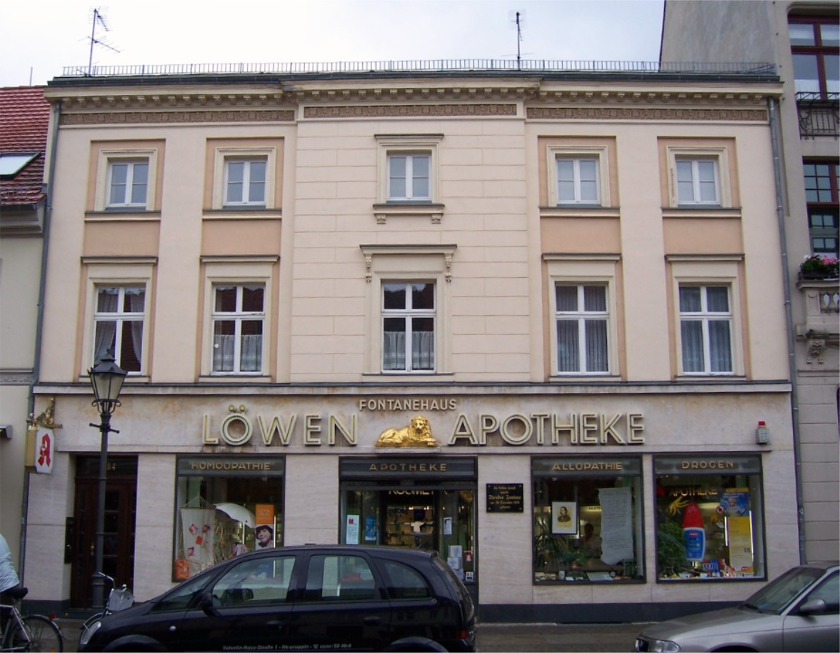 Fontanehaus in Neuruppin, in dem Theodor Fontane zur Welt kam.